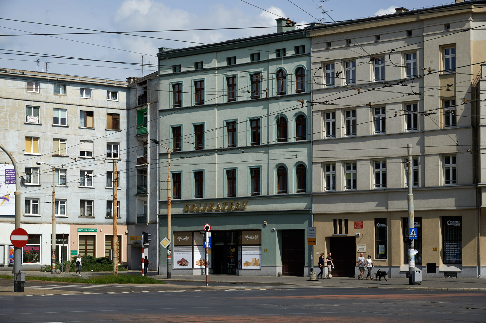 Od prawej: kamienica przy Sądowej 9a i przylegająca do niej 8a (obie wybudowane około roku 1865 [sic!]), dalej w lewo w skrócie perspektywicznym wąski pas bloku z lat 60 XX wieku przy pl. Legionów 1, i następny blok - Sądowa 9.